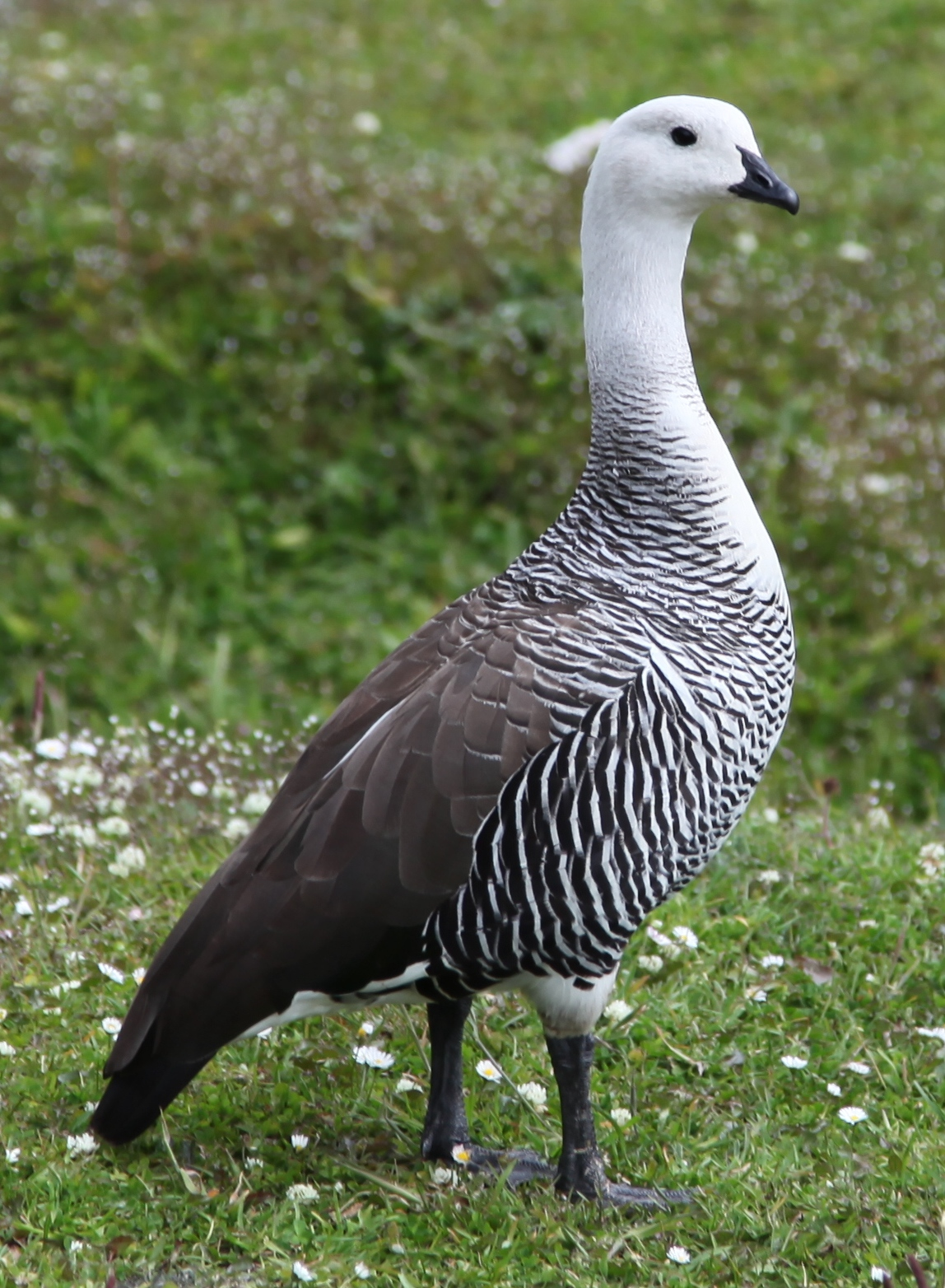 Upland Goose in Tierra del Fuego National Park